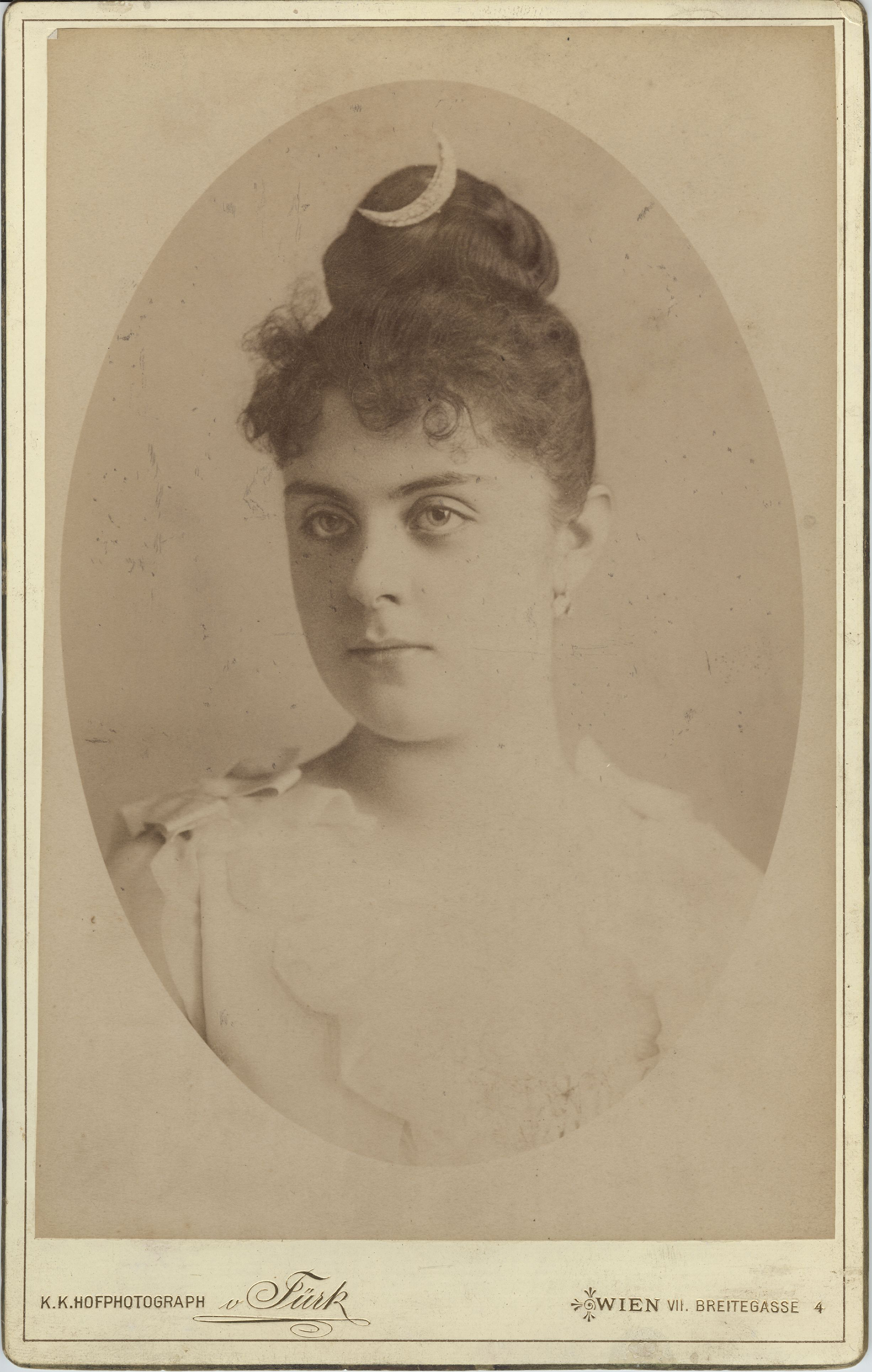 Portrait Mary Vetsera